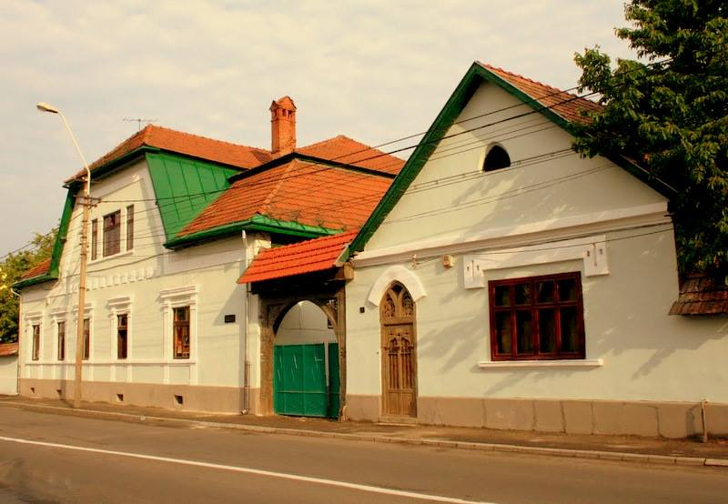 Casa Teleky Sandor